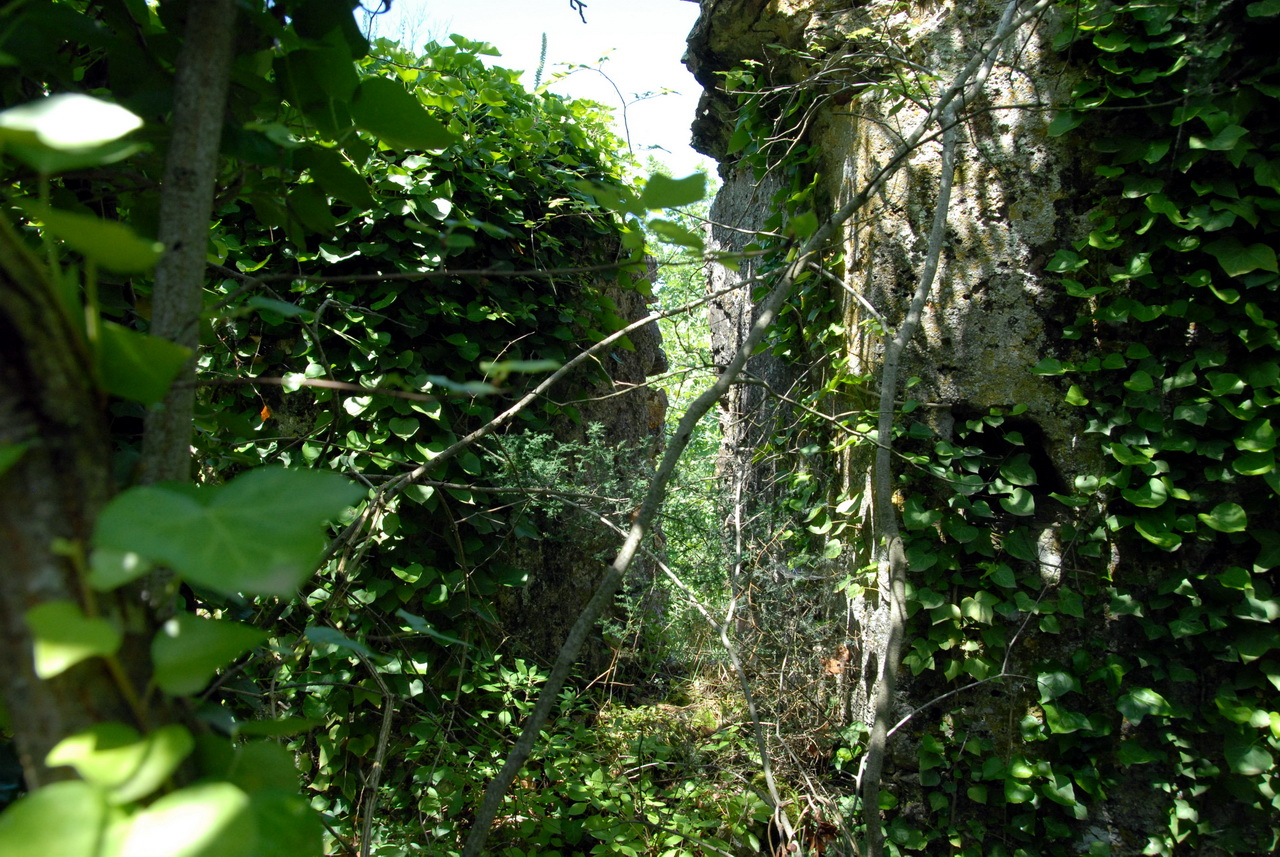 I ruderi della chiesa di Sant'Angelo a Piesco nei pressi di Benevento